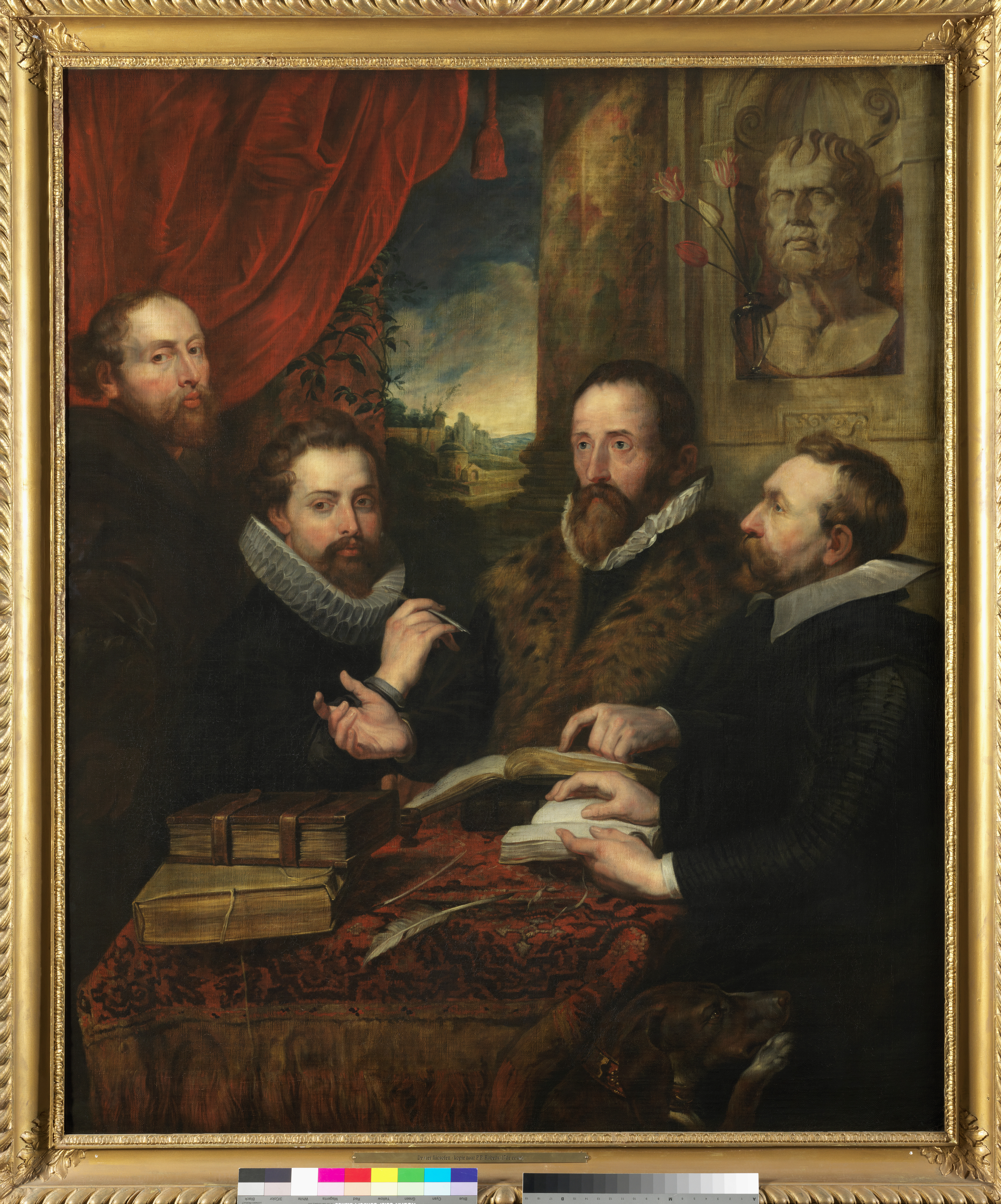 schilderij ( Museum Plantin-Moretus